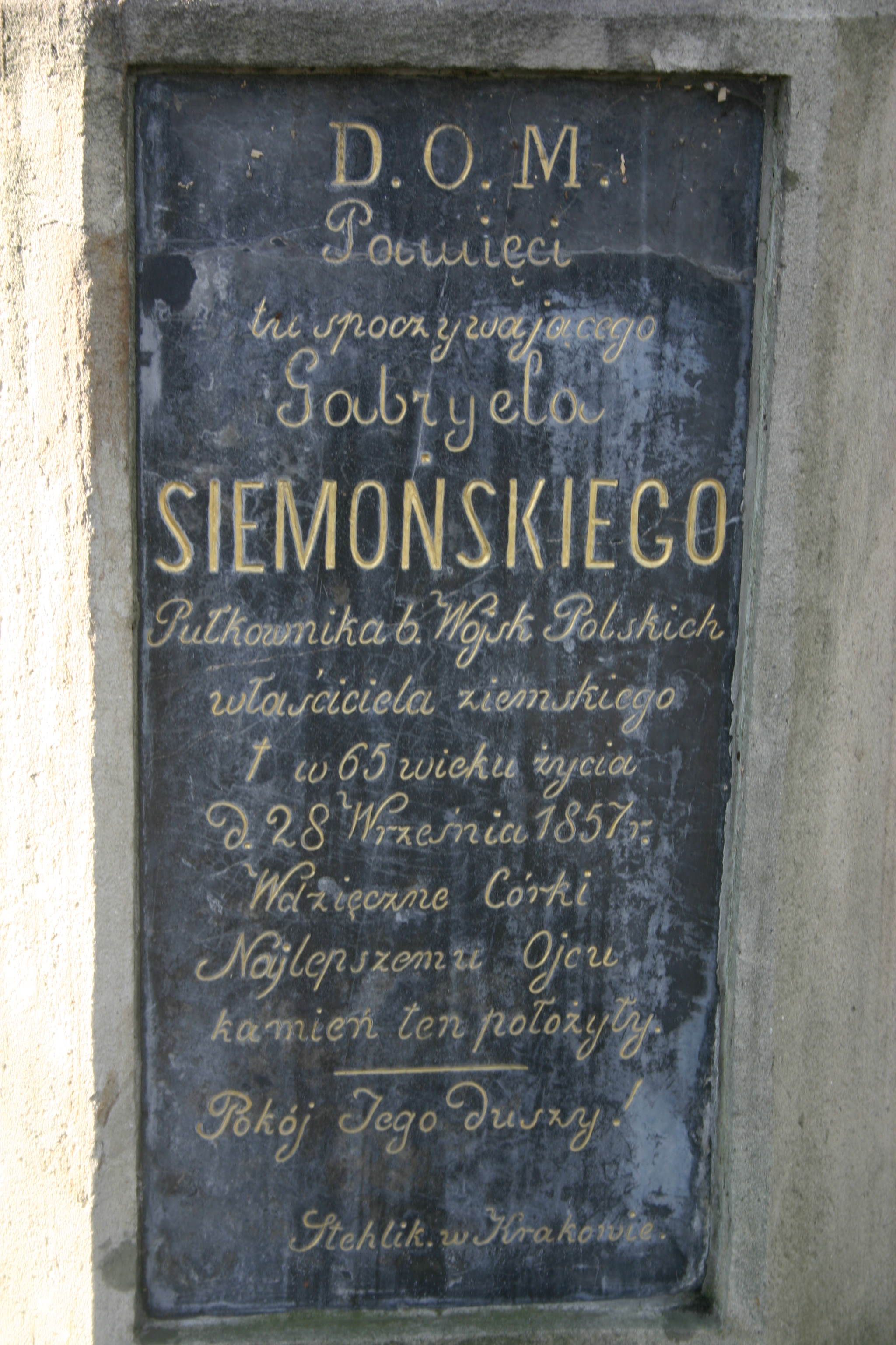 Epitafium na nagrobku Gabriela Tadeusza Siemońskiego na Starym Cmentarzu w Tarnowie (pomnik znajduje się przy XVII kwaterze). Treść epitafium: "D.O.M. Pamięci tu spoczywającego Gabryela Siemońskiego Pułkownika Wojsk Polskich, Właściciela Ziemskiego w 65 wieku życia D. 28 września 1857 roku. Wdzięczne córki Najlepszemu Ojcu Kamień ten położyły. Pokój Jego Duszy"